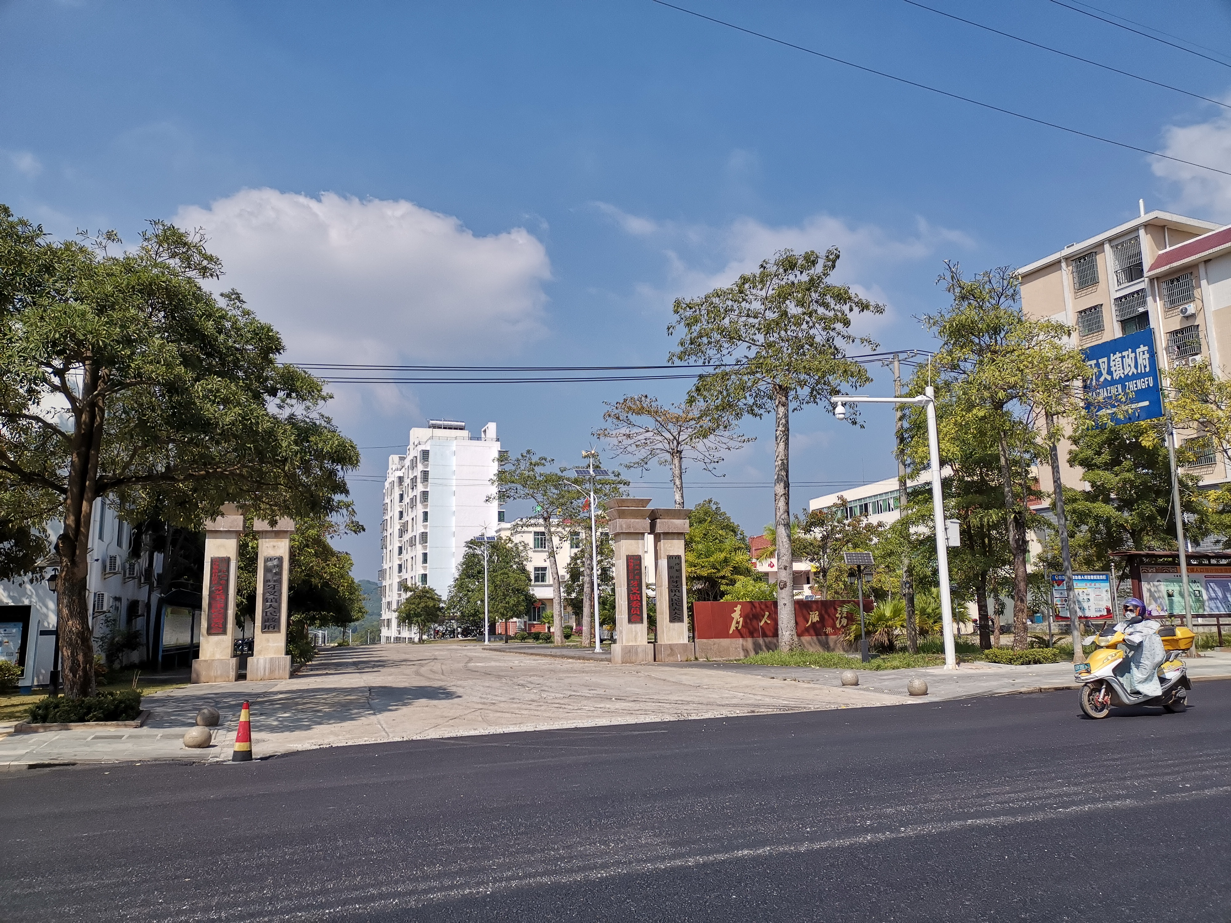 中文（中国大陆）: 牙叉镇人民政府，位于白沙黎族自治县